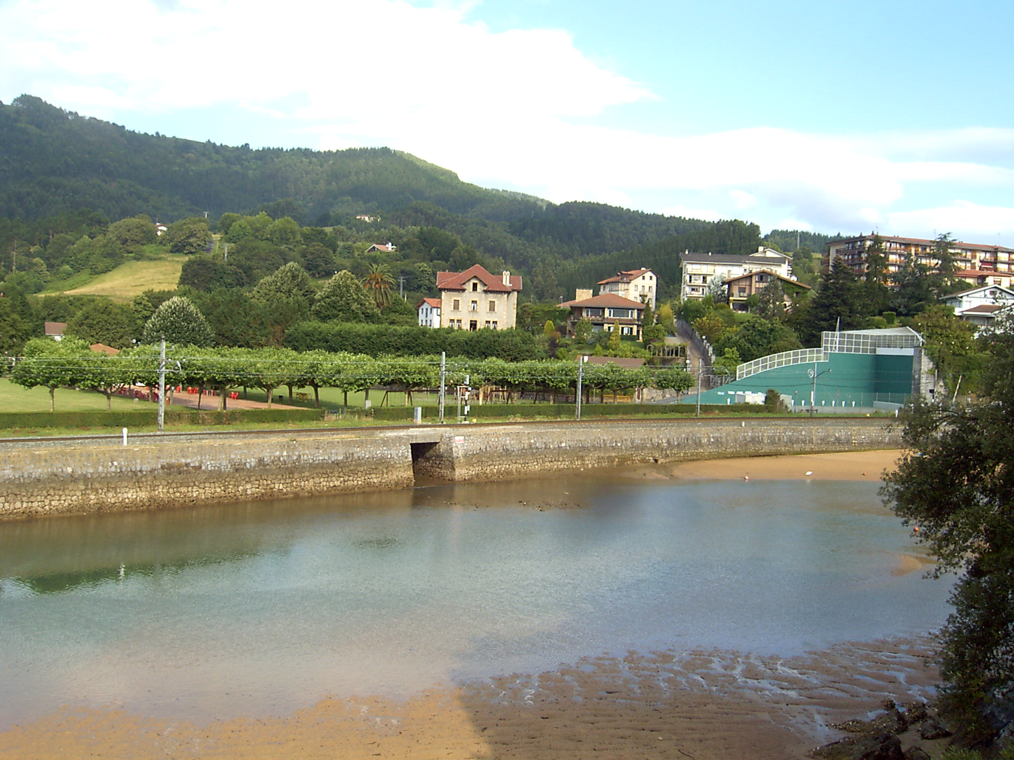 Sukarrieta